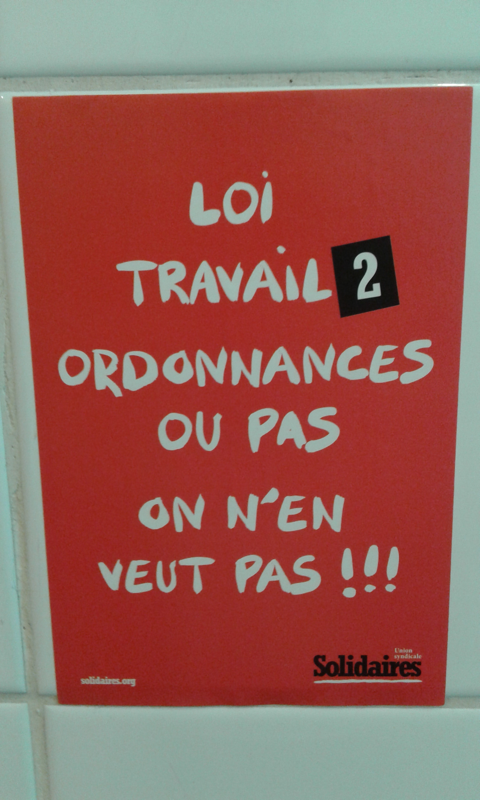 Autocollant du syndicat français Solidaires, contre la réforme du Code du Travail par ordonnances en 2017, établissant un lien de té avec les manifestations contre la Loi Travail de 2016.